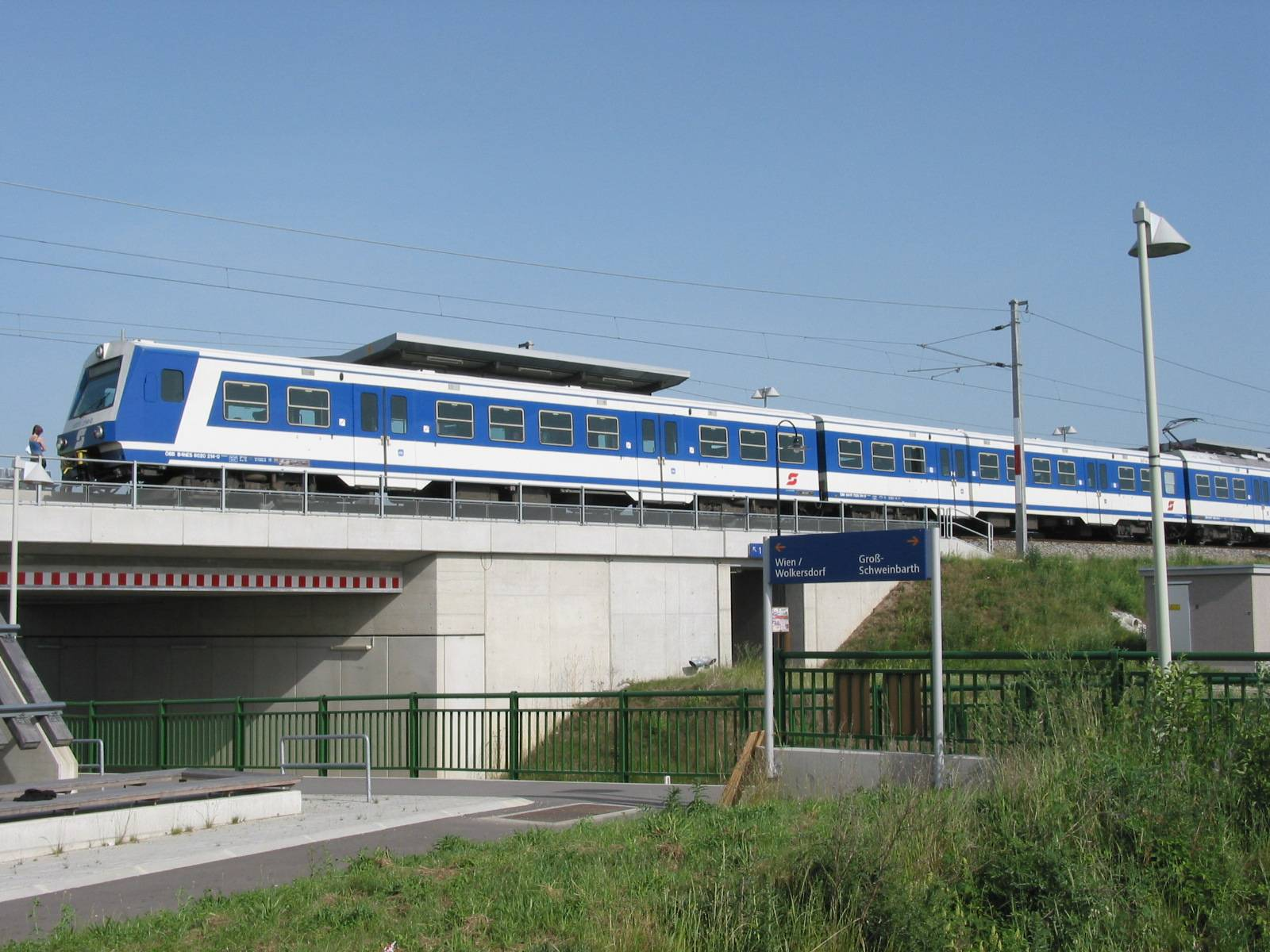 de: S-Bahn in Oberdorf en: S-Bahn in Obersdorf